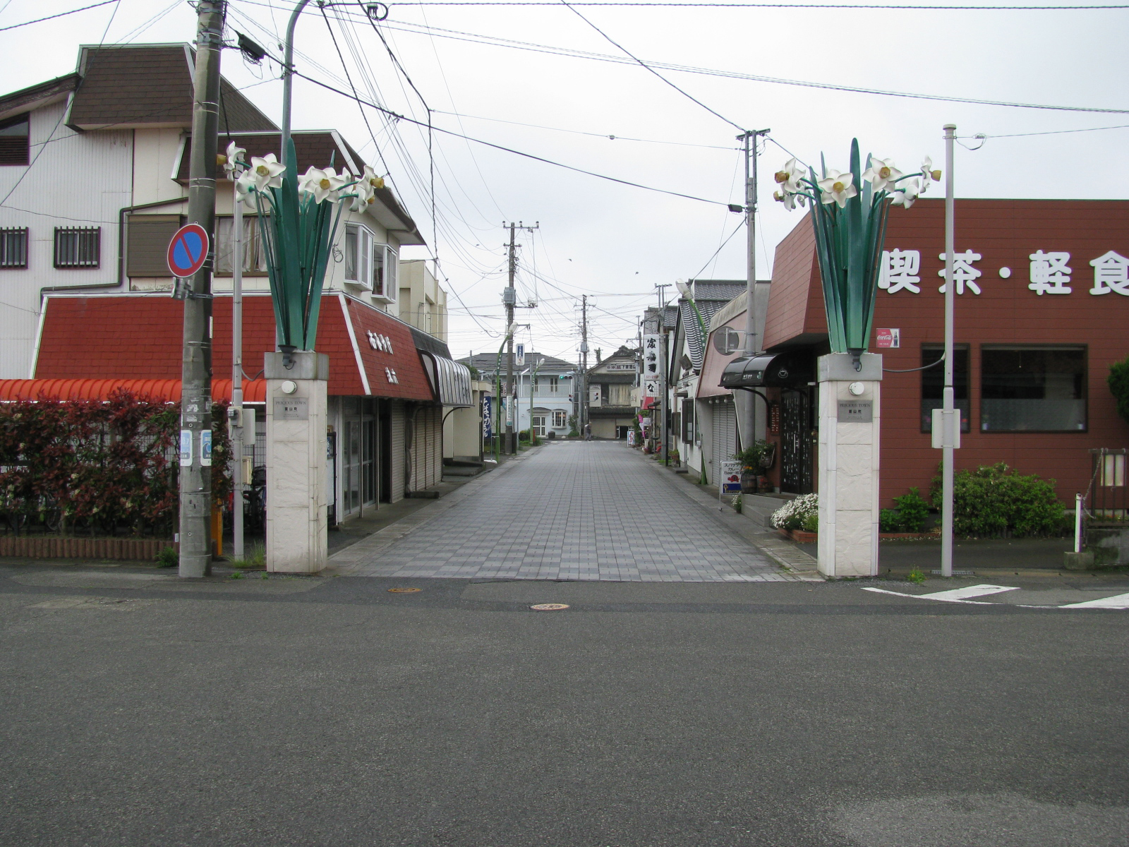 内房線岩井駅